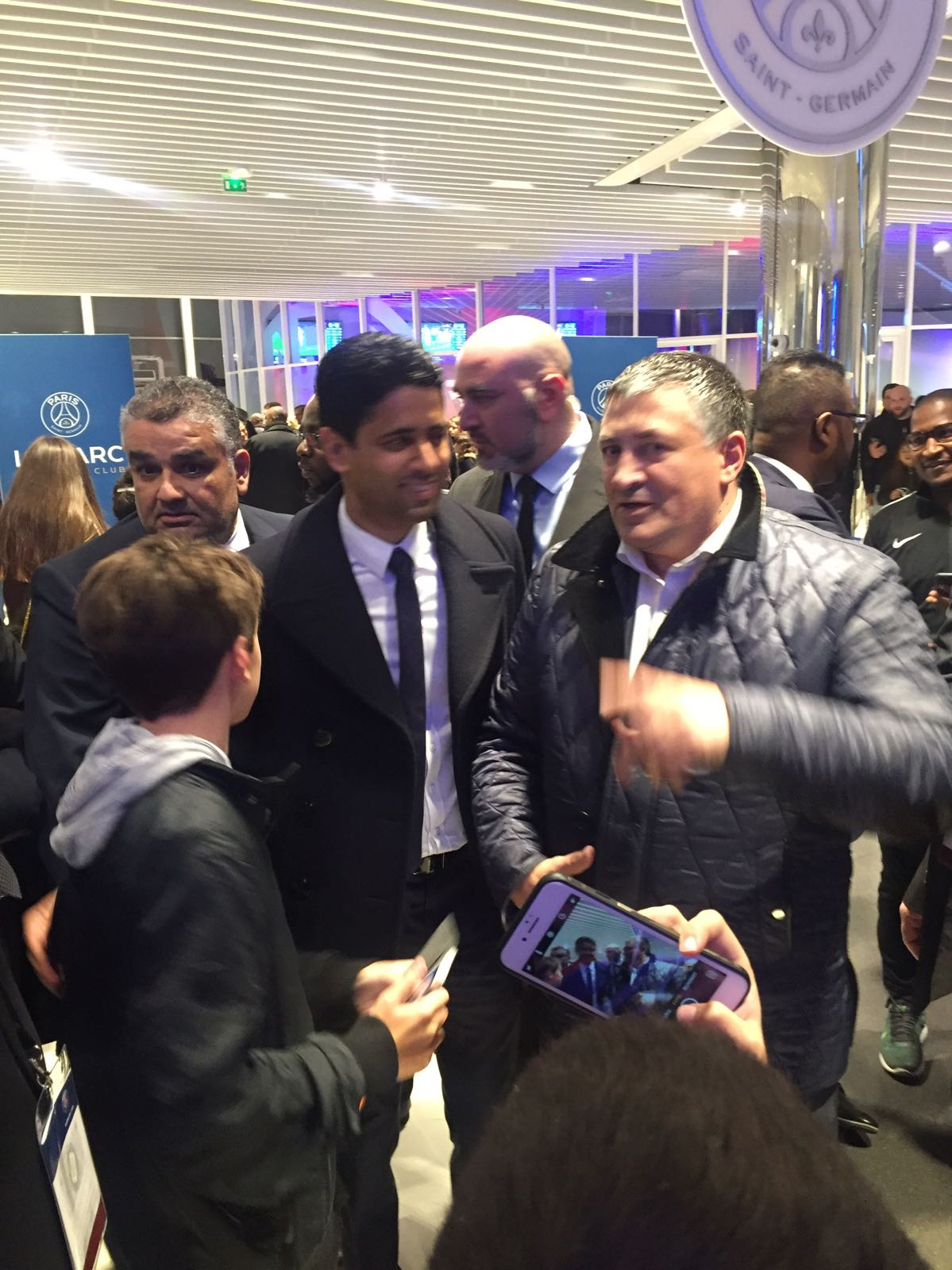 Susret Ivice Tončeva sa vlasnikom PSG-a Naserom Al Kelafijem. Pariz, 26. oktobar 2017. Nakon utakmice PSG - OGC Nice.